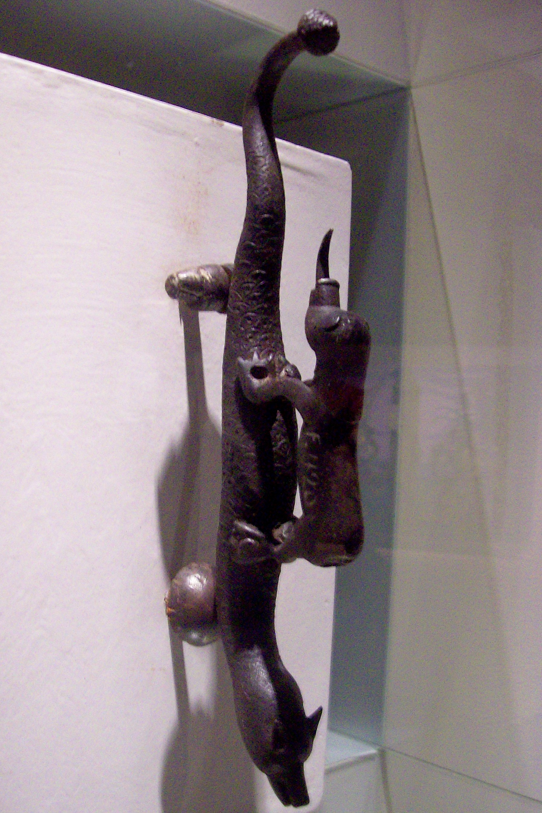 Aldabón que perteneció al Fuerte de Buenos Aires, exhibido en el Museo del Bicentenario, Buenos Aires, Argentina.